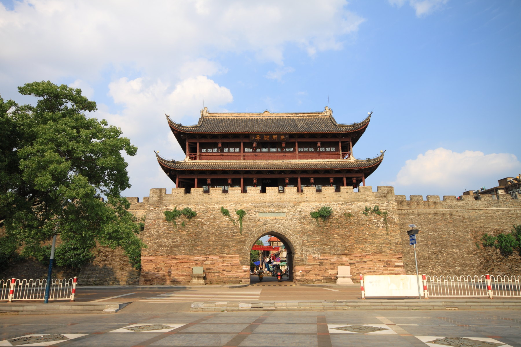 衢州城墙水亭门，全国重点文物保护单位，位于衢州市。